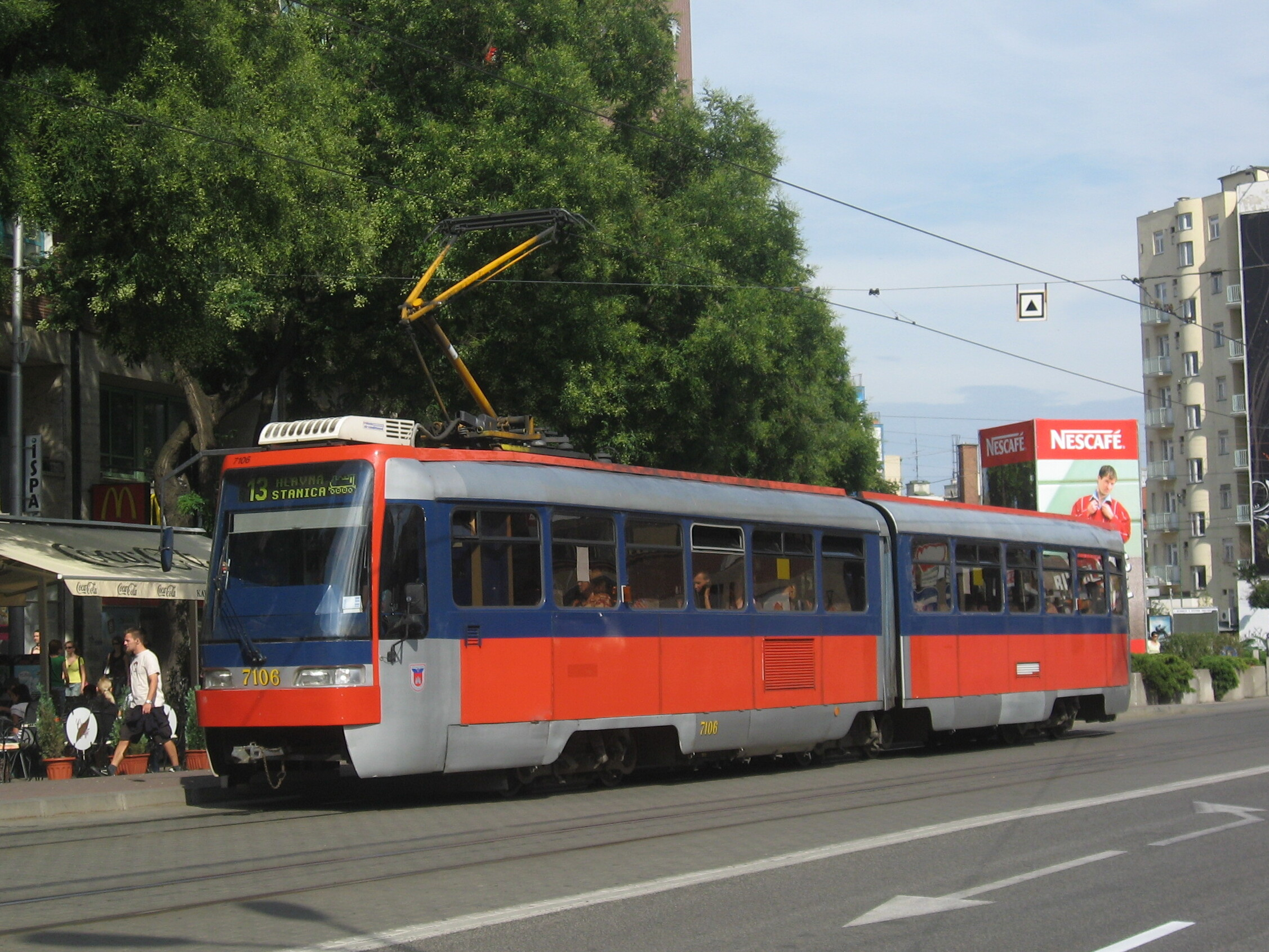 Bratislava, tramvaj